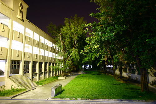 台南高工教學大樓